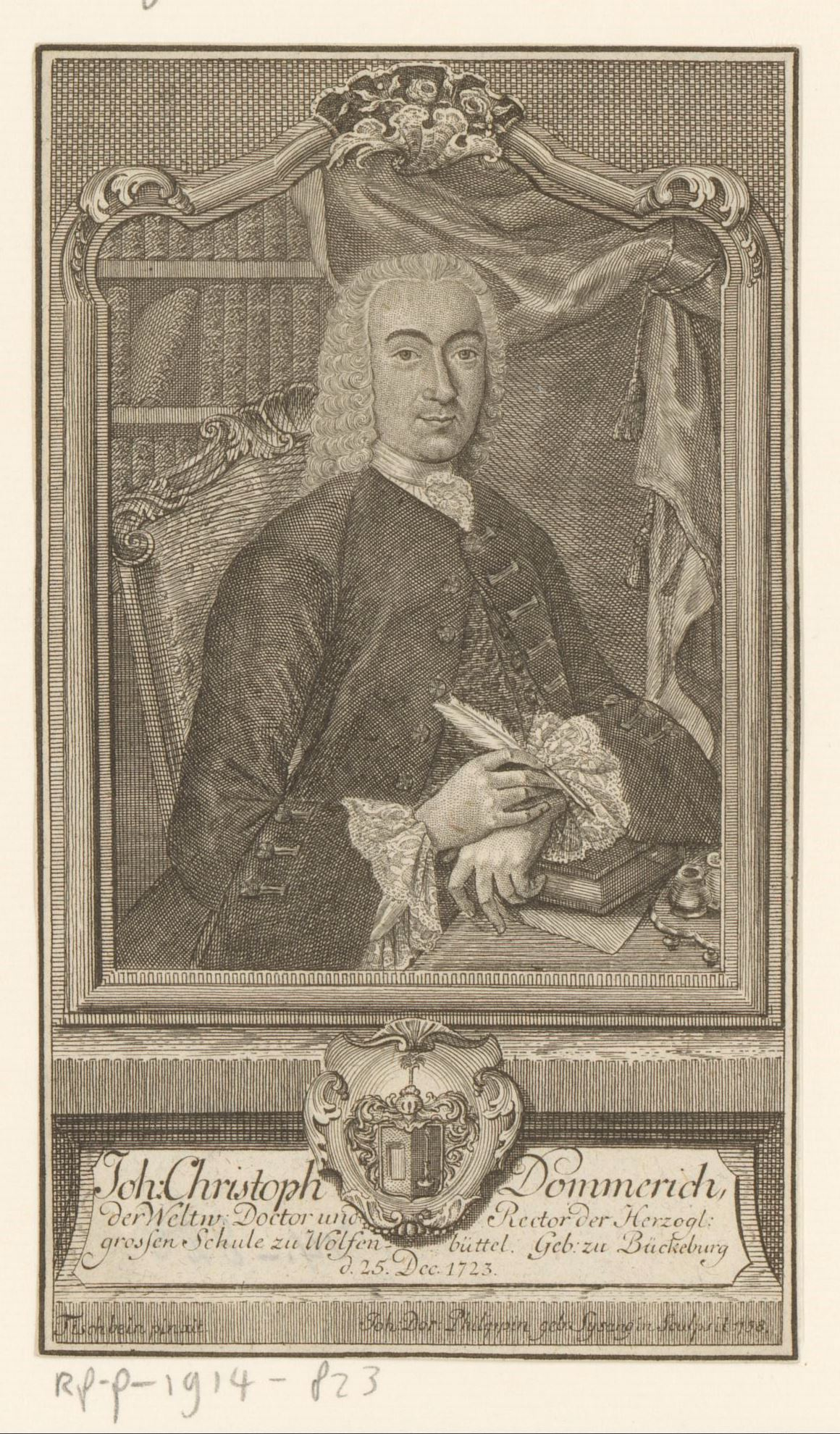 IdentificatieTitel(s): Portret van Johann Christoph DommerichObjecttype: prent Objectnummer: RP-P-1914-823Catalogusreferentie: HAB A 5056Opschriften / Merken: verzamelaarsmerk, verso, gestempeld: Lugt 2228VervaardigingVervaardiger: prentmaker: Johanna Dorothea Sysang (vermeld op object)naar schilderij van: Johann Heinrich Tischbein (1722-1789) (vermeld op object)Datering: 1739 - 1791Fysieke kenmerken: gravureMateriaal: papier Techniek: graveren (drukprocedé)Afmetingen: blad: h 155 mm (binnen de plaatrand afgesneden) × b 90 mm (binnen de plaatrand afgesneden)OnderwerpWat: historical personswriting accessoriesbookshelvesWie: Johann Christoph DommerichVerwerving en rechtenVerwerving: aankoop 1905Copyright: Publiek domein